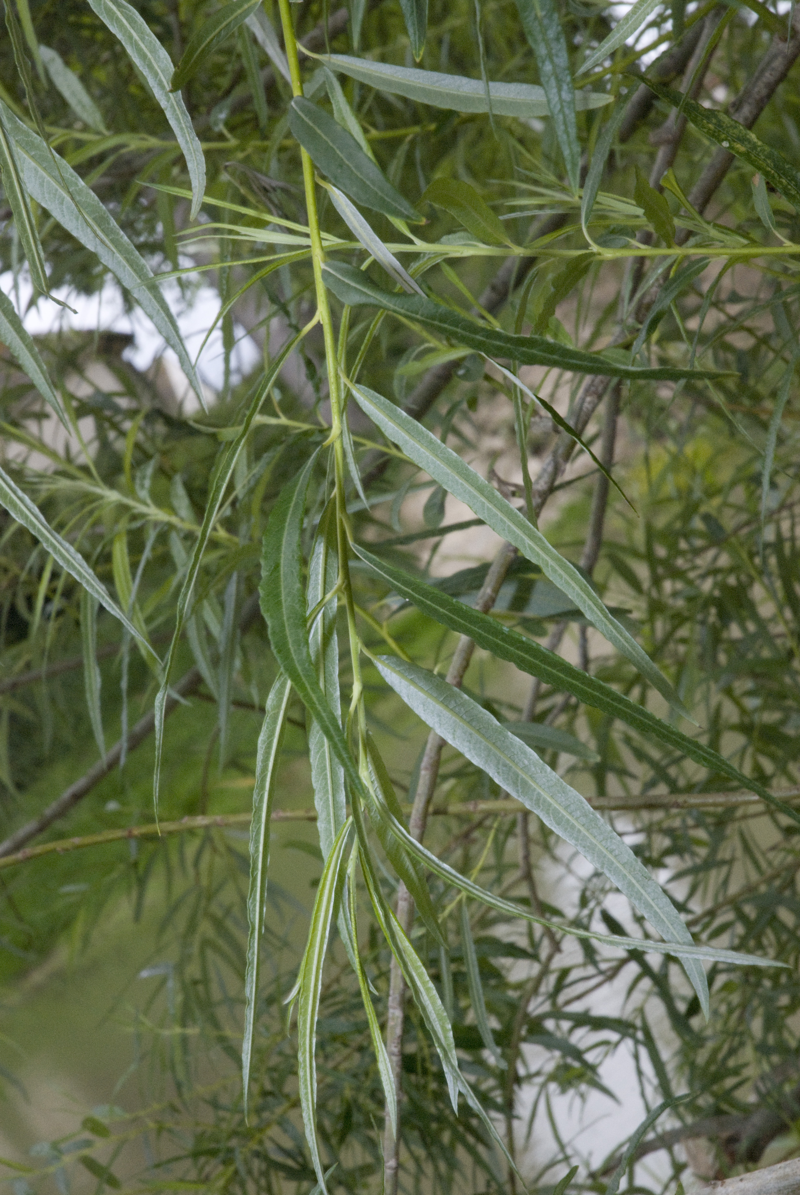 Salix viminalis Berry-au-Bac (Aisne), France